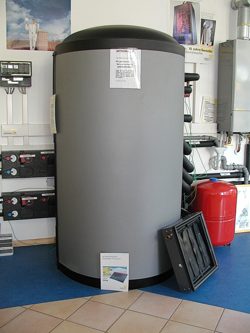 ein Warmwasserschichtspeicher